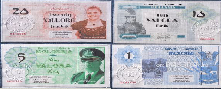 Valora